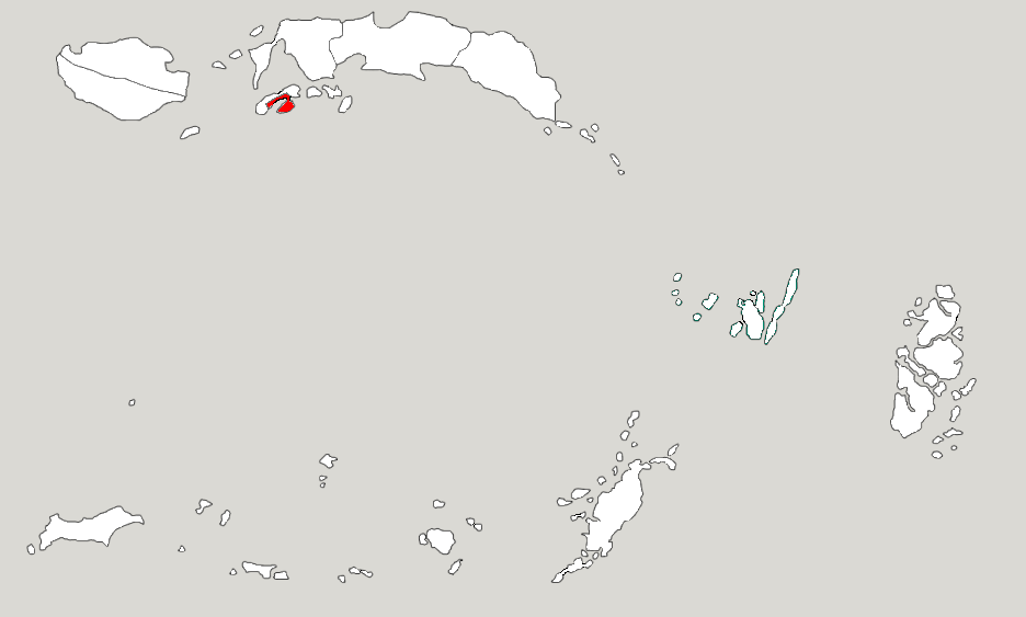 Місто Амбон